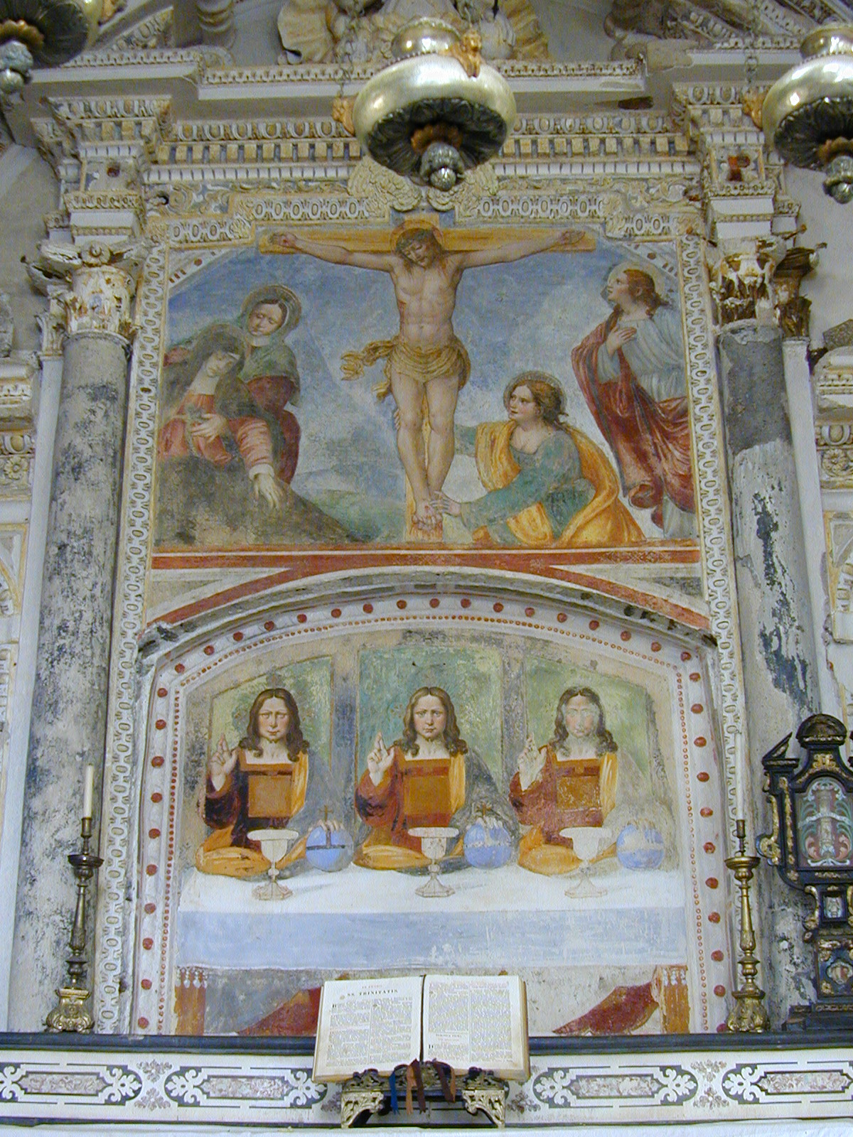 Sacro Monte di Ghiffa. Affreschi all'interno del Santuario.